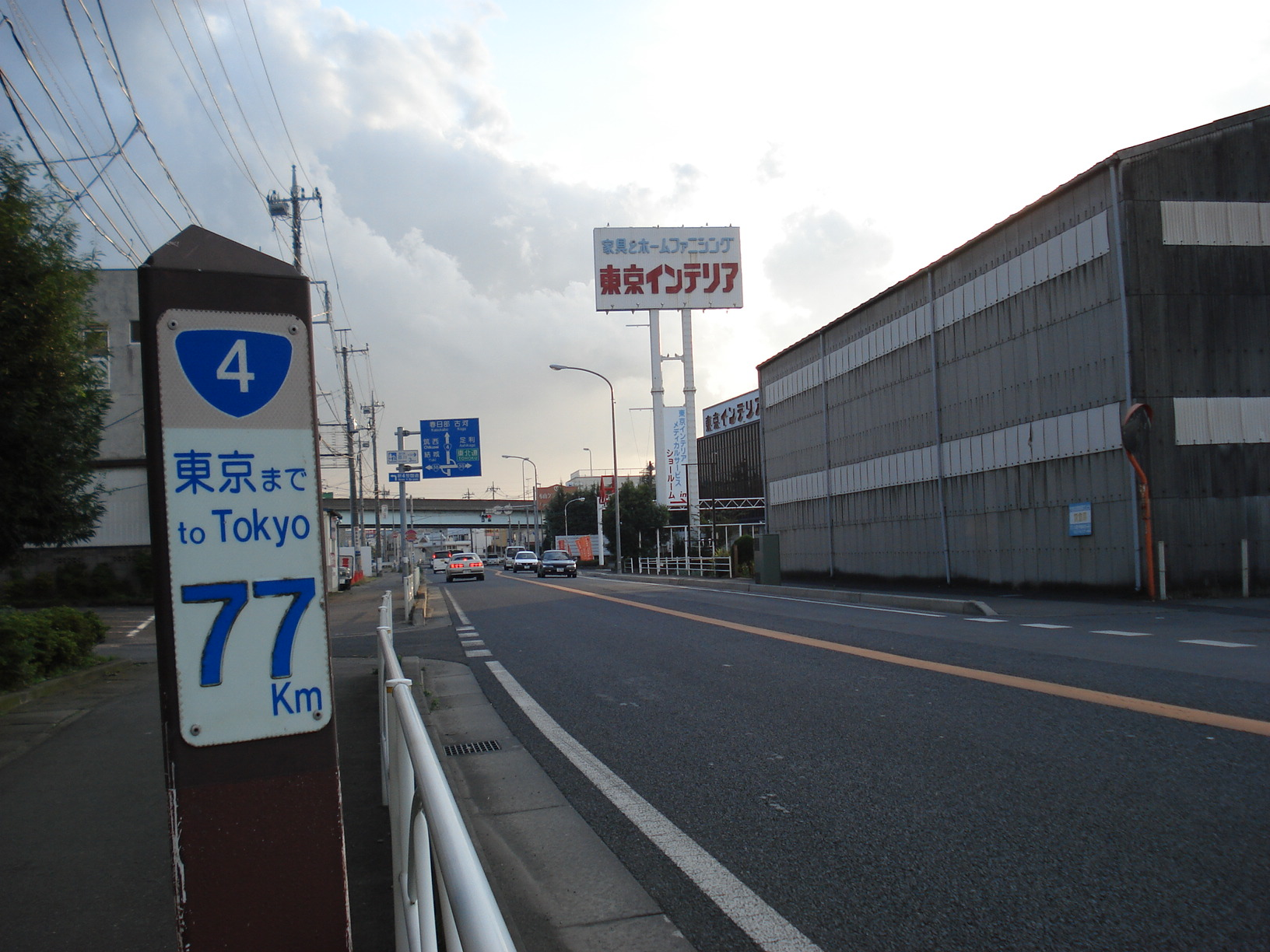 国道4号線 小山バイパス